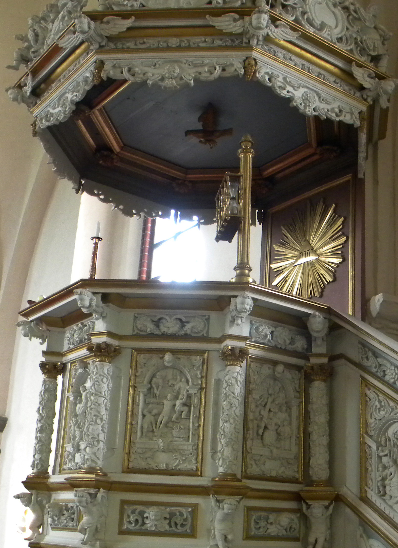 Predikstol från 1600-talet med tetragrammet JHWH i solsymbolen i Askersunds landskyrka